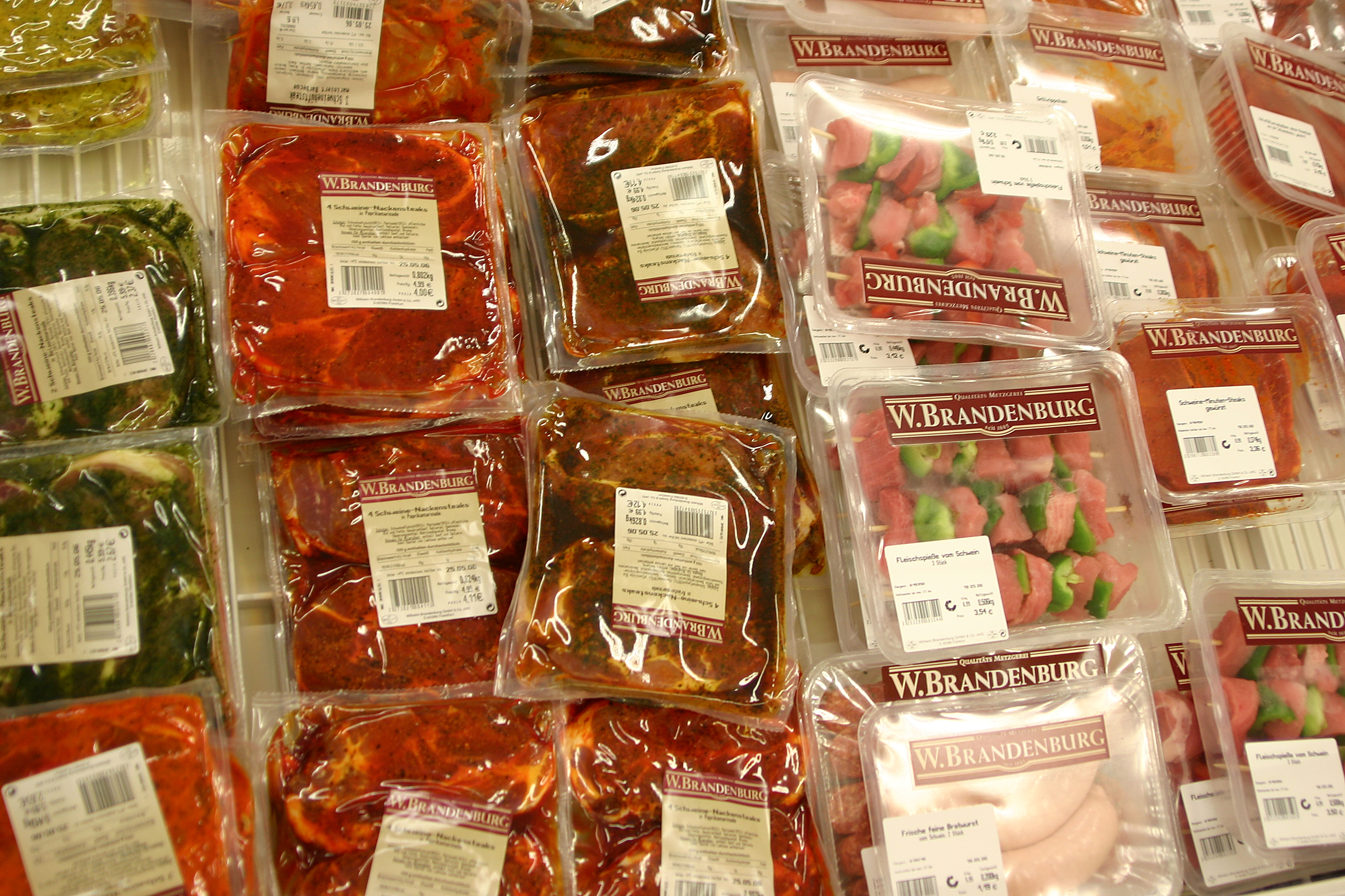 Bilder im Supermarkt REWE